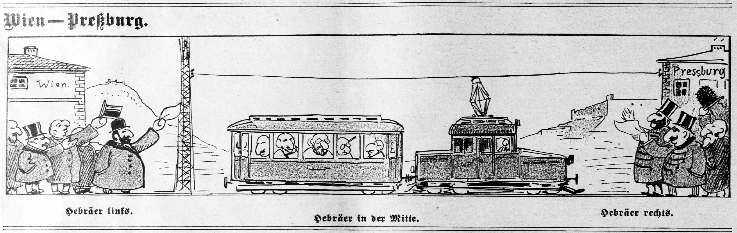 Pressburger-Bahn, Karikatur des Kikeriki aus Anlass einer Probefahrt